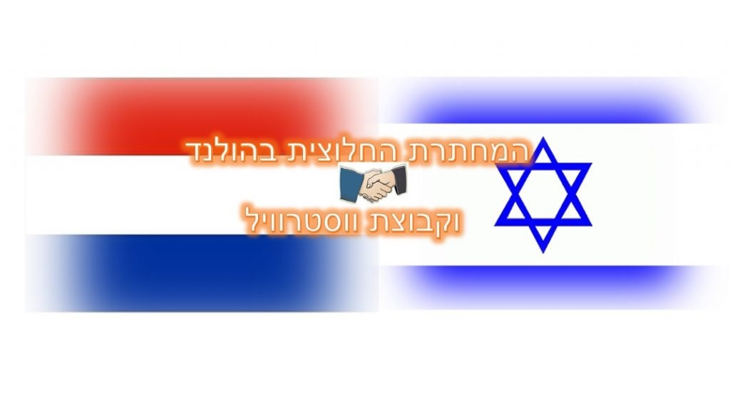 לוגו "קבוצת ווסטרוויל". הלוגו שבו שילוב ידיים על רקע דגלי הולנד וישראל, בא לסמל את שיתוף הפעולה ב"מחתרת החלוצית - קבוצת ווסטרוויל" בין קבוצת החלוצים היהודים וקבוצת ההולנדים נוצרים.